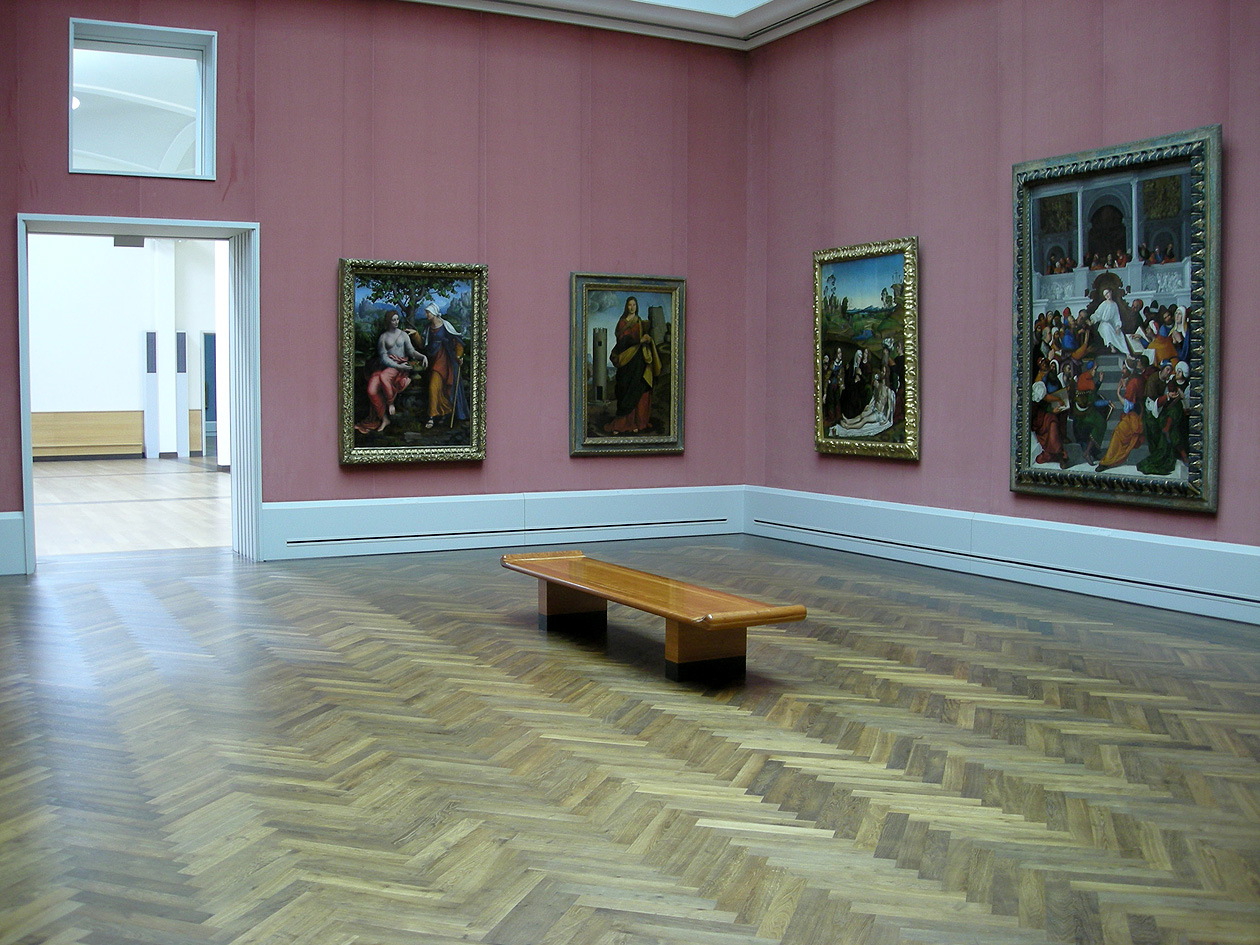 Gemäldegalerie Berlin. Interieur. Italienische Malerei der Renaissance